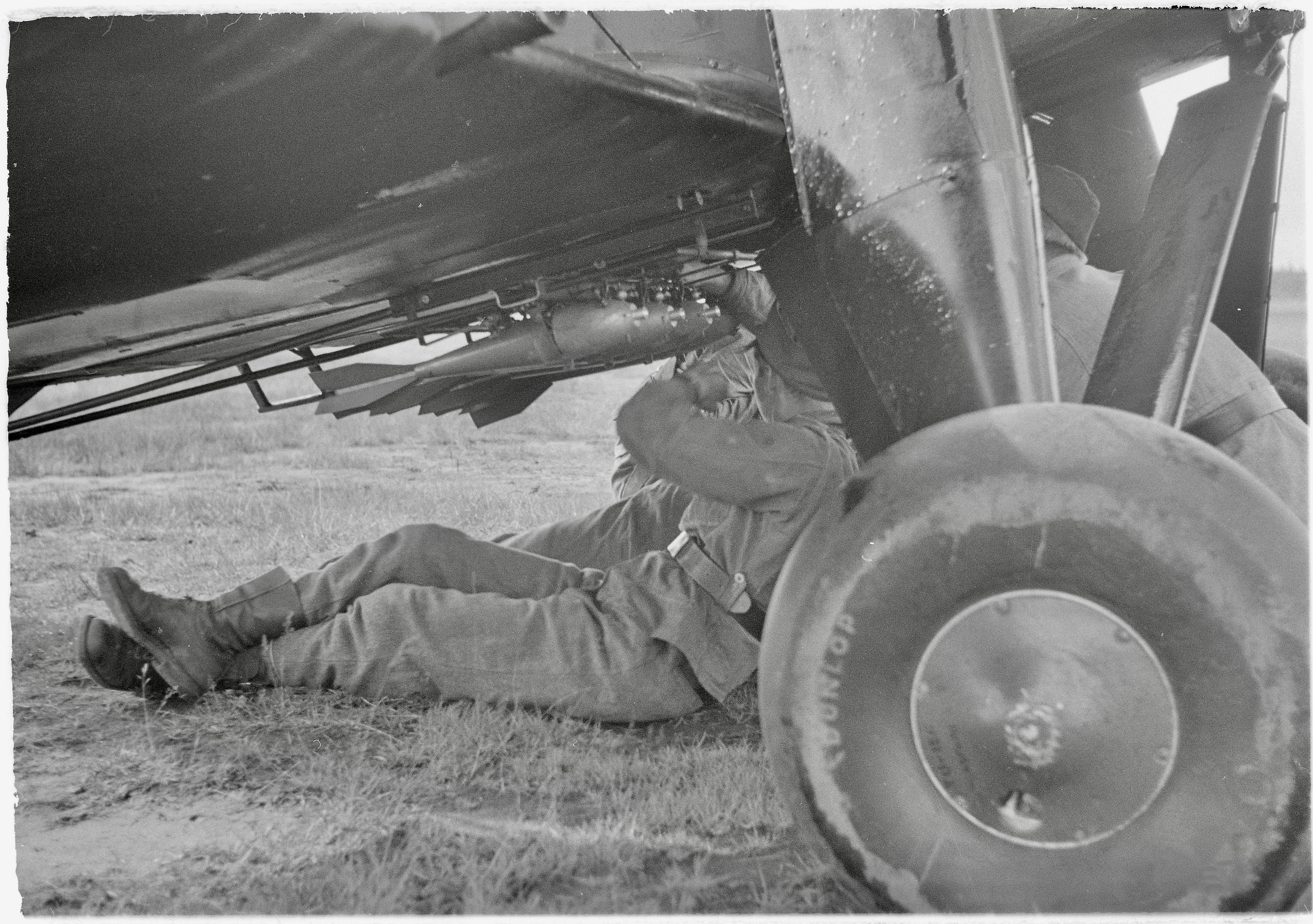 Harjoituspommeja kiinnitetään Laajalahden tähystäjäleirillä Tuiskun Tolfan-ripustimiin.